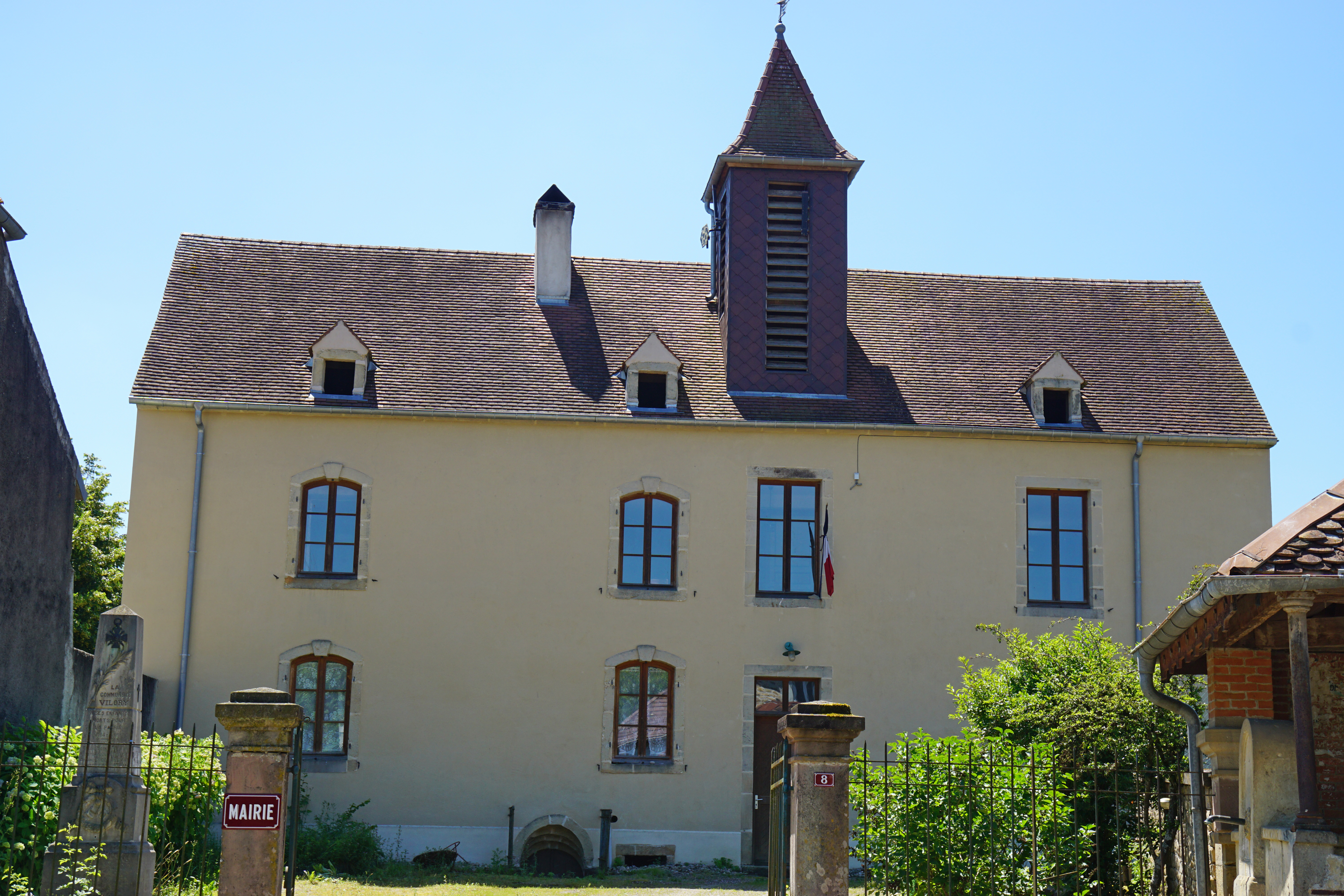 Mairie de Vilory.